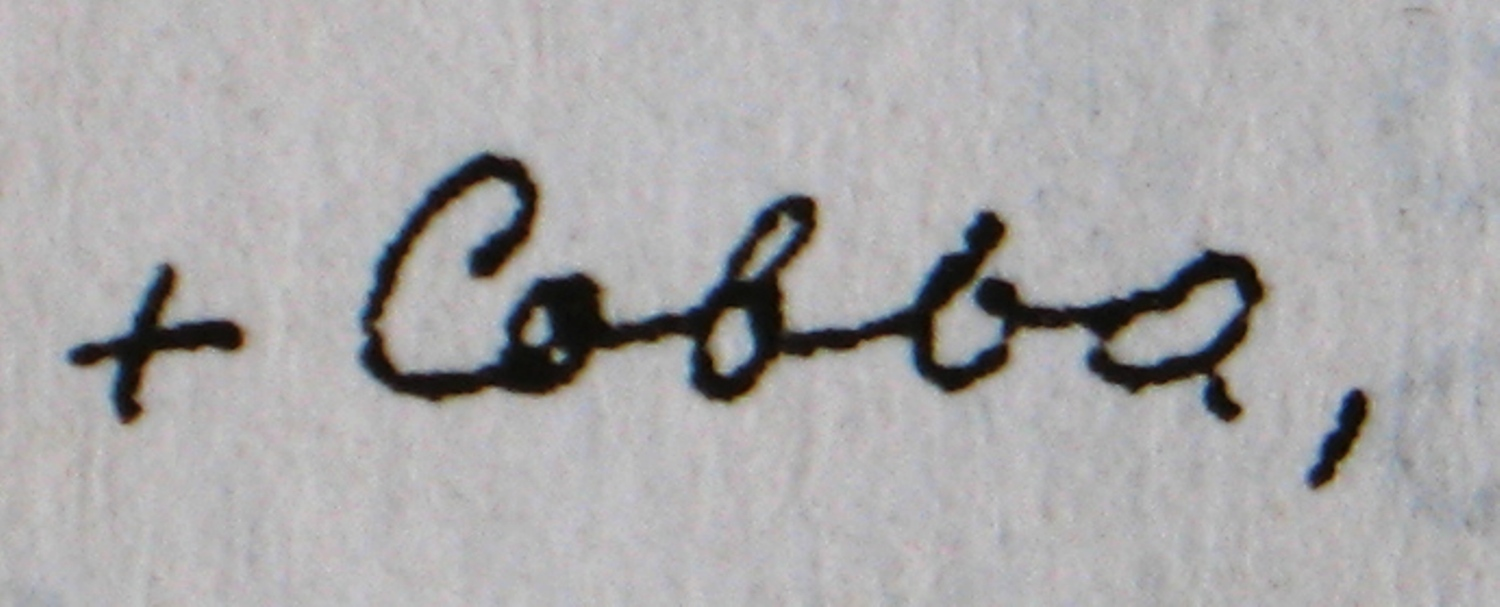 Подпись православного Митрополита Варшавского и Всея Польши Саввы под рождествеским посланием митрополиту Никодиму Руснаку. На русском языке. Варшава, конец декабря 2001 года.